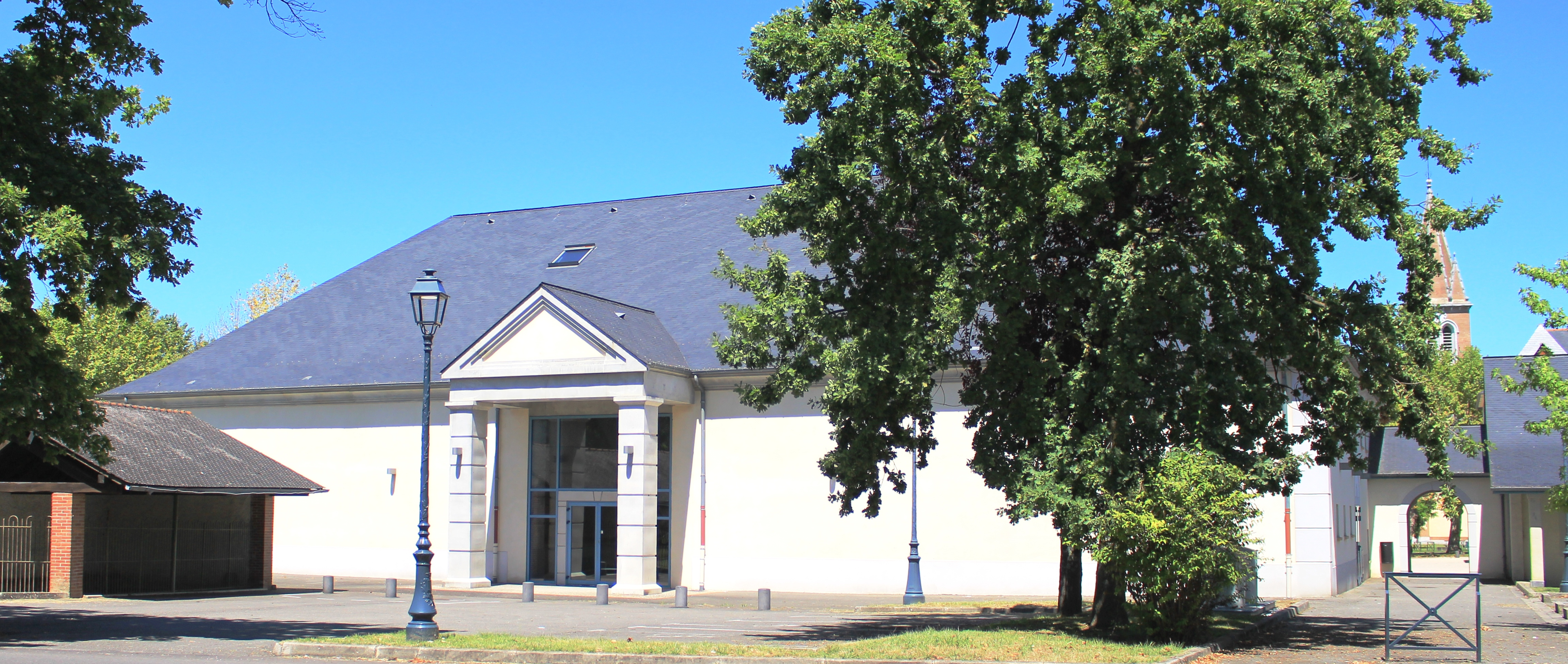 Salle des fêtes de Laloubère (Hautes-Pyrénées)